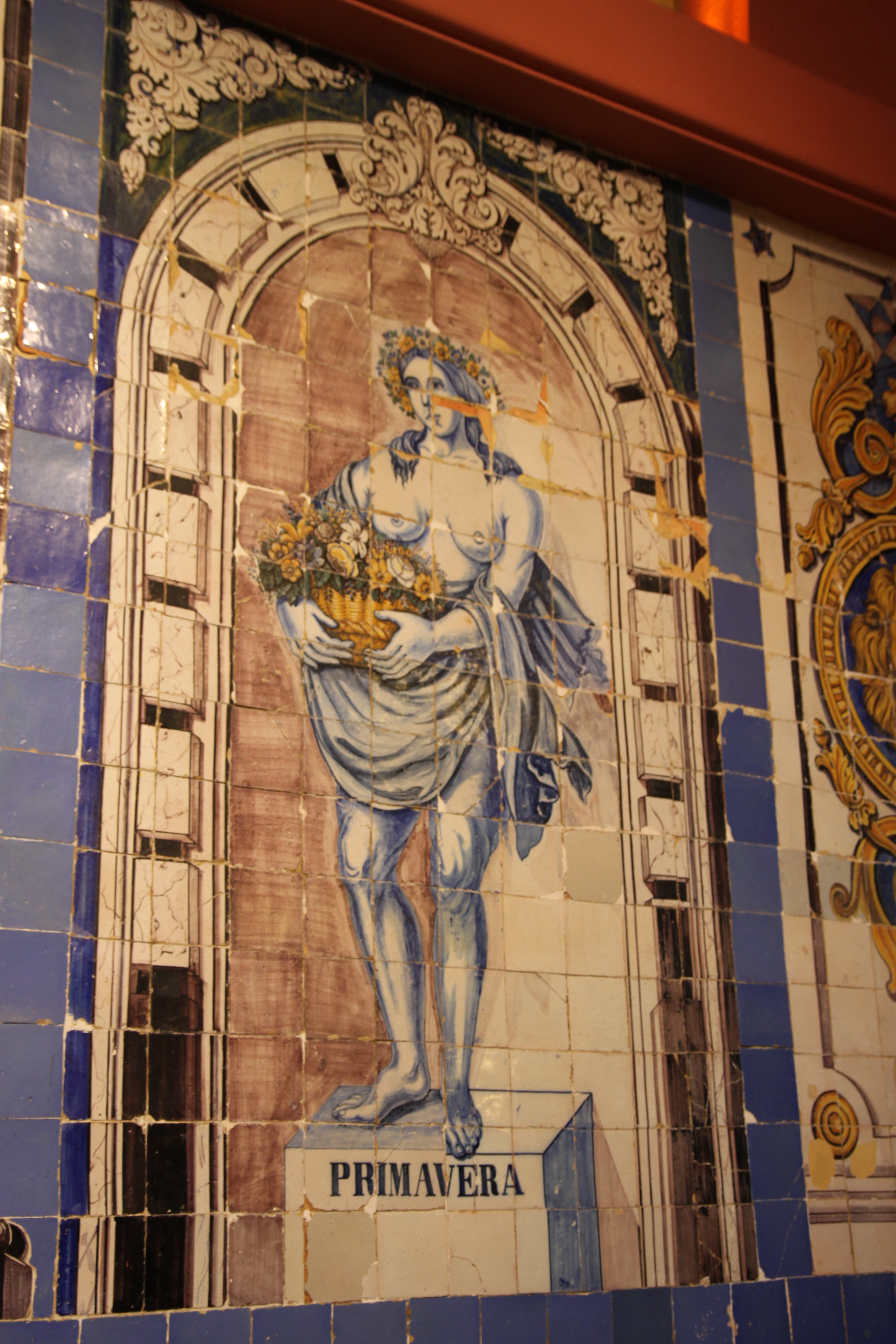 Edifício na Rua Nova da Trindade, n.º 20 This file was uploaded for Wiki Loves Monuments in Portugal with the unique identifier 97019784.